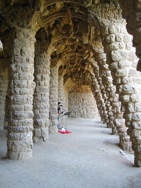 Estructuras del Parc Güell.